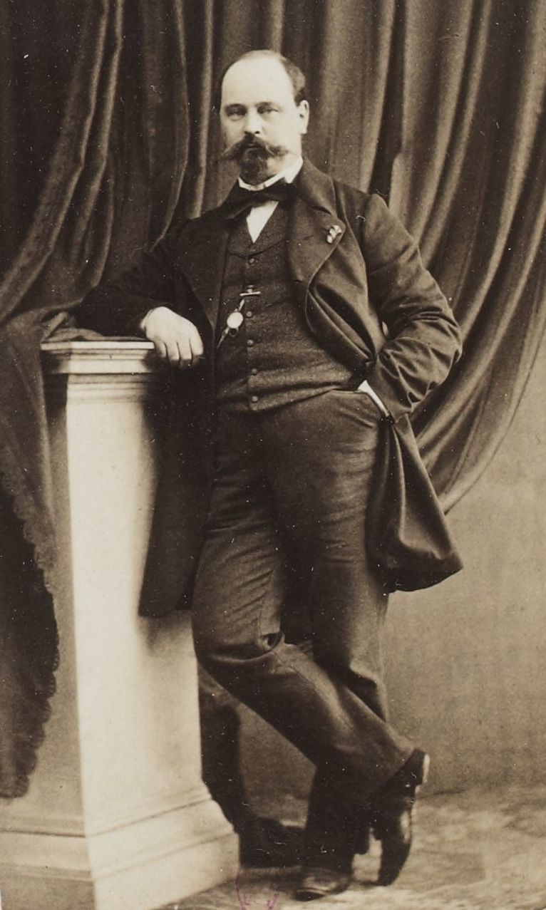 Personnalités françaises et étrangères sous le Second Empire.